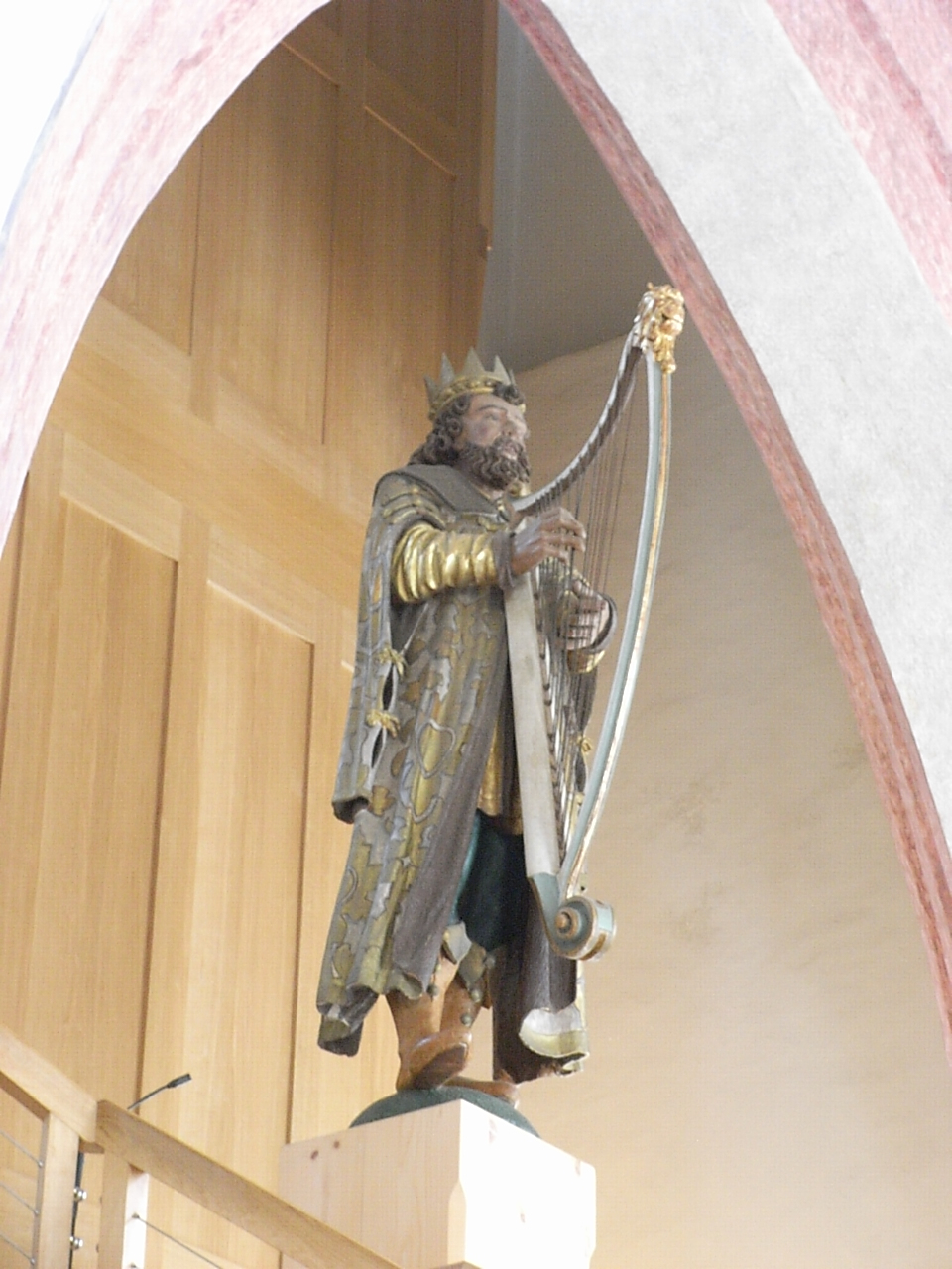 Eine der wenigen geschnitzten Einzelfiguren in St. Martin zu Memmingen